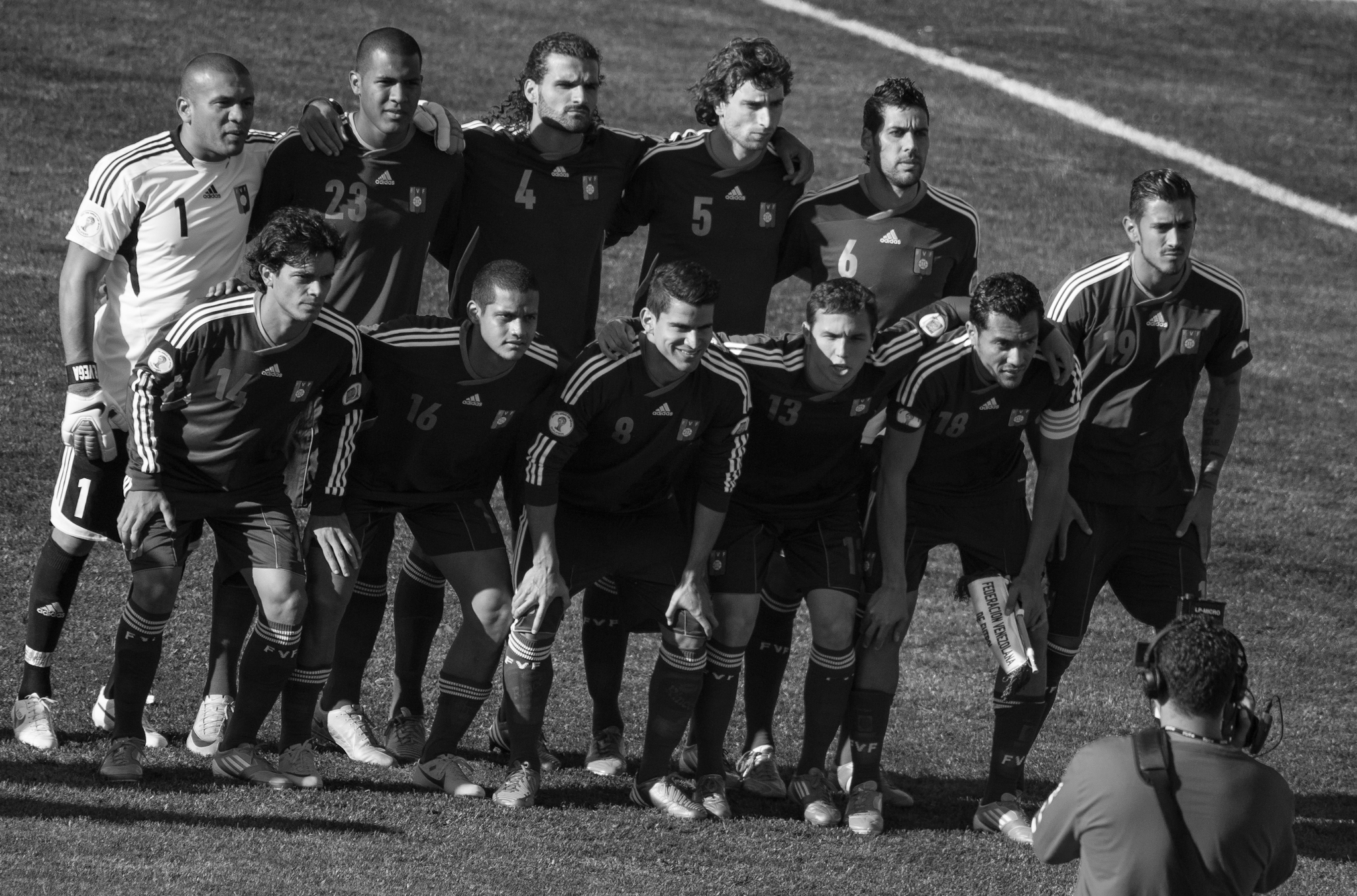 Arriba de izquierda a derecha: Renny Vega, Salomón Rondón, Oswaldo Vizcarrondo, Fernando Amorebieta y Gabriel Cichero. Abajo de izquierda a derecha: Giacomo Di Giorgi, Roberto Rosales, Tomás Rincón, Luis Manuel Seijas, Juan Arango y Frank Feltscher